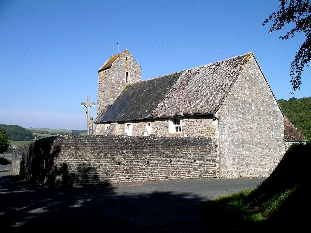 Église Saint Sulpice du XVIIe à Caumont-sur-Orne (Calvados)